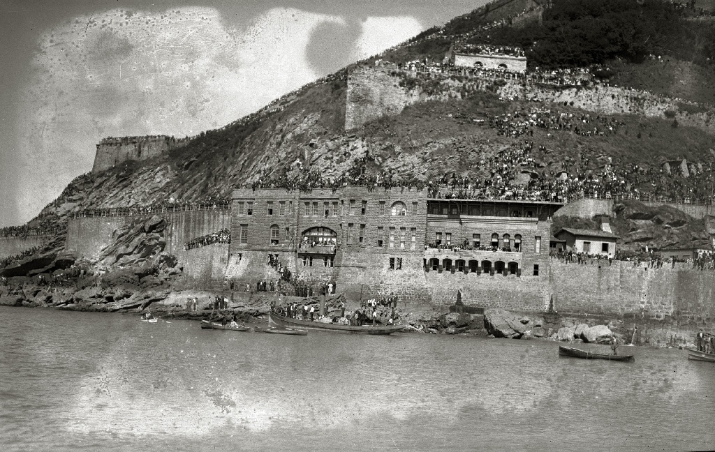 Título original: Celebración de las regatas de la Concha (5/12) Localización: San Sebastián (Guipúzcoa)